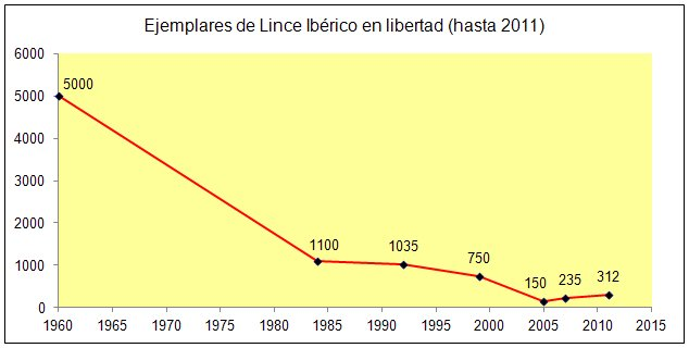 Gráfica sobre la evolución de la población del lince ibérico